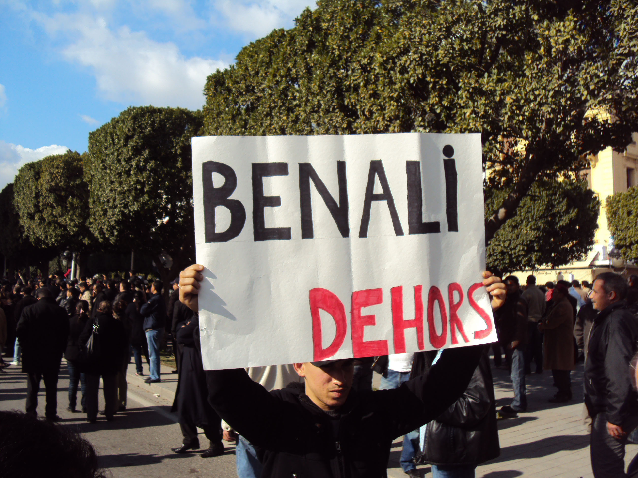 Photo prise lors de la manifestation du 14 janvier 2011 devant le ministère de l'intérieur à l'Avenue Habib Bourguiba - Tunis, un manifestant brandissant une pancarte avec le slogan : Ben Ali DEHORS